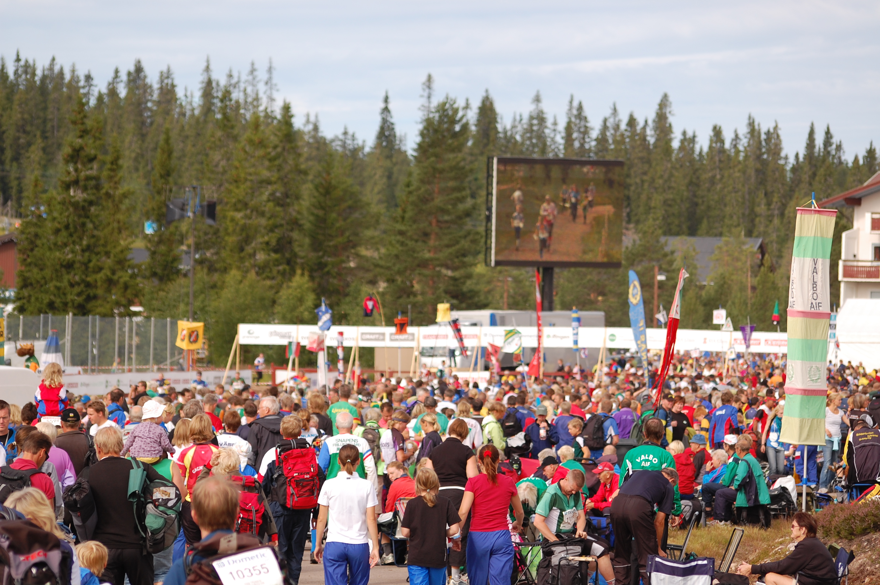 Notikumiem var sekot līdzi uz lielā ekrāna